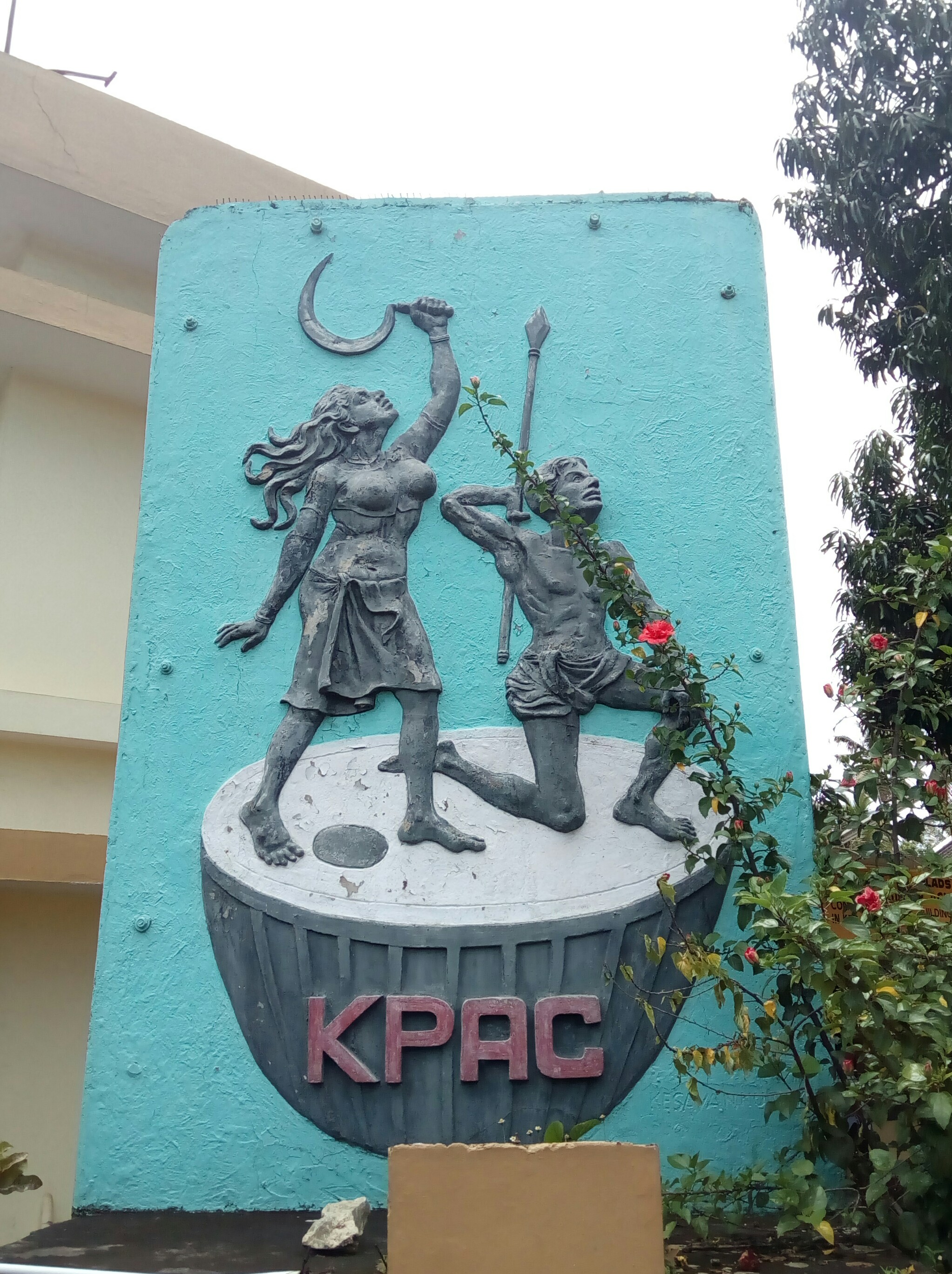 KPAC Emblem